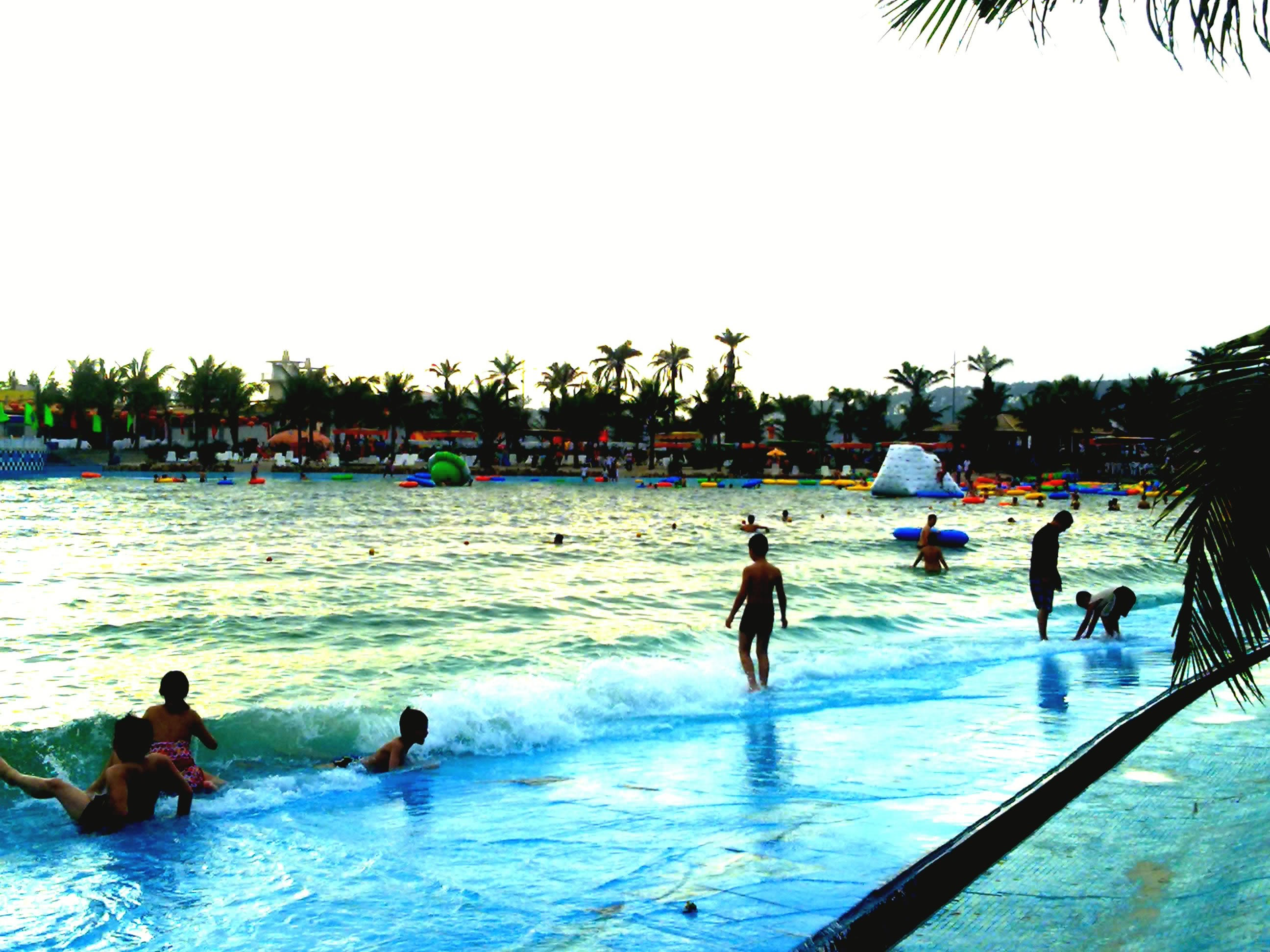 Ảnh chụp từ điện thoại: Bể bơi Hòn Dáu ở Hải Phòng